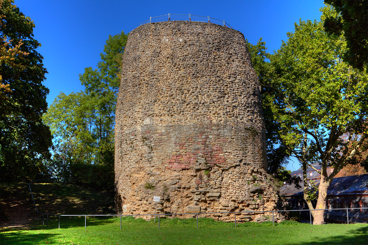 Gesamtansicht des Drusussteins von der Südostseite